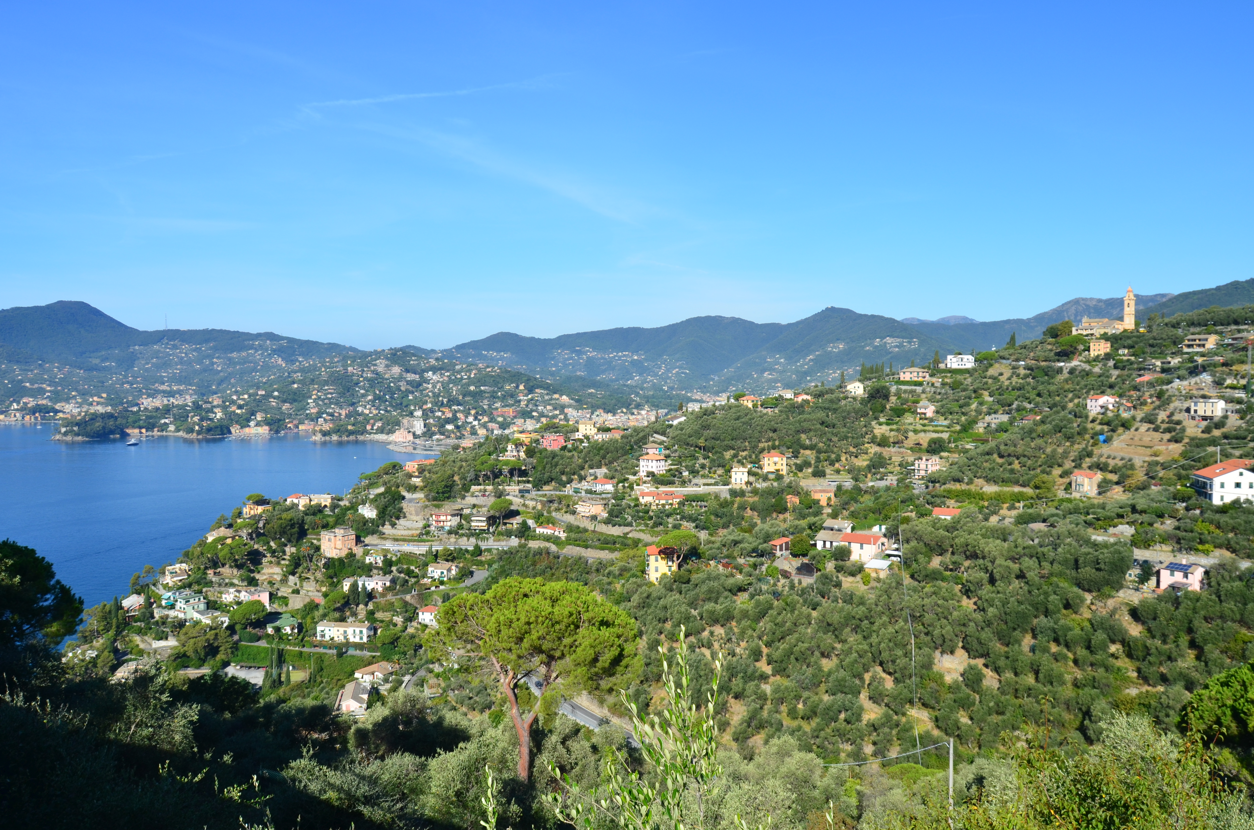 Panorama della frazione di Sant'Ambrogio, Zoagli, Liguria, Italia